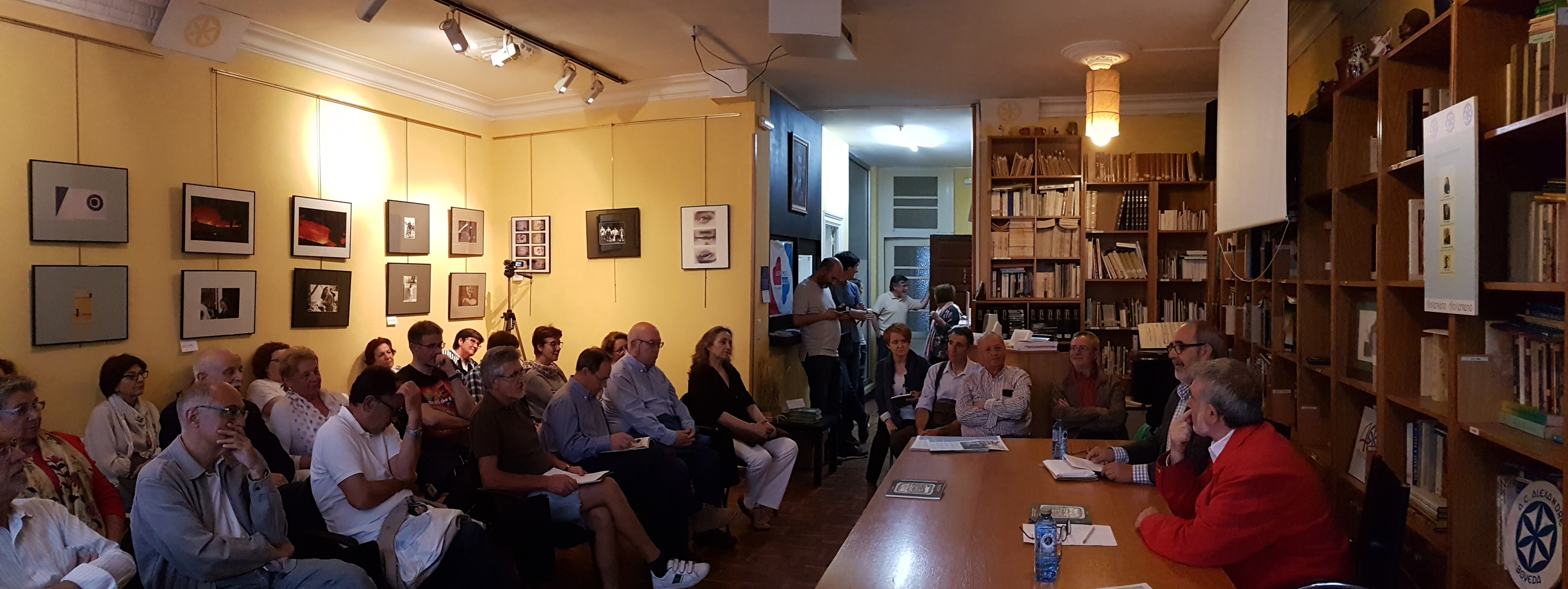 Presentación do poemario "Ritual para unha tribo capital do concello" de Manuel María